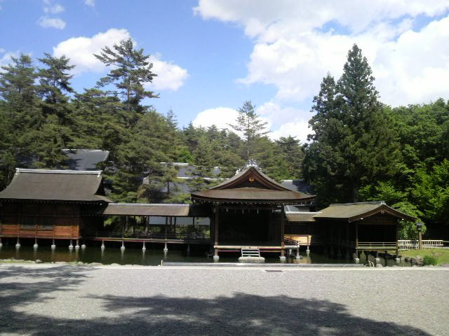 身曾岐神社拝殿正面